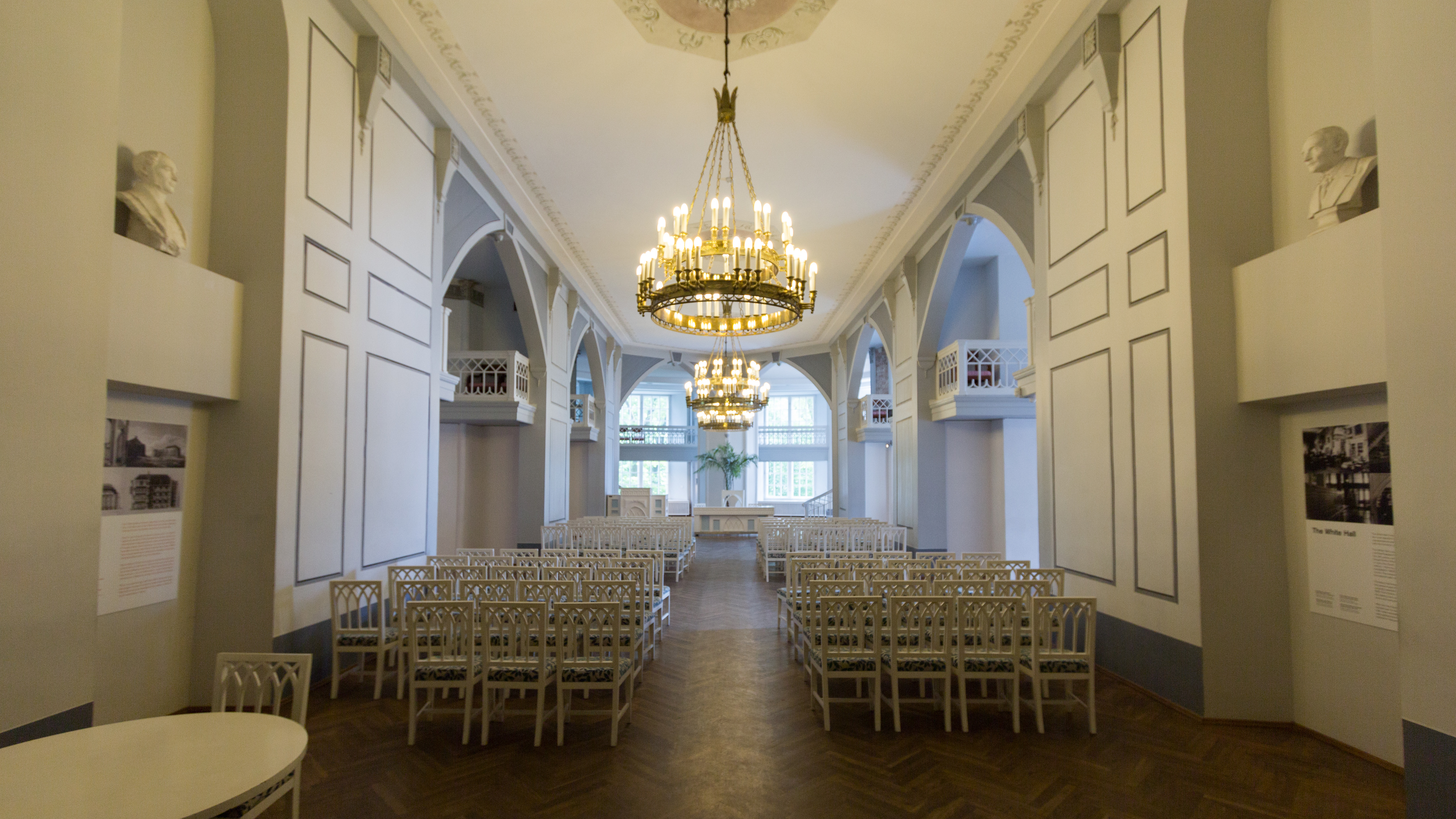 Tartu ülikooli muuseumi interjöör